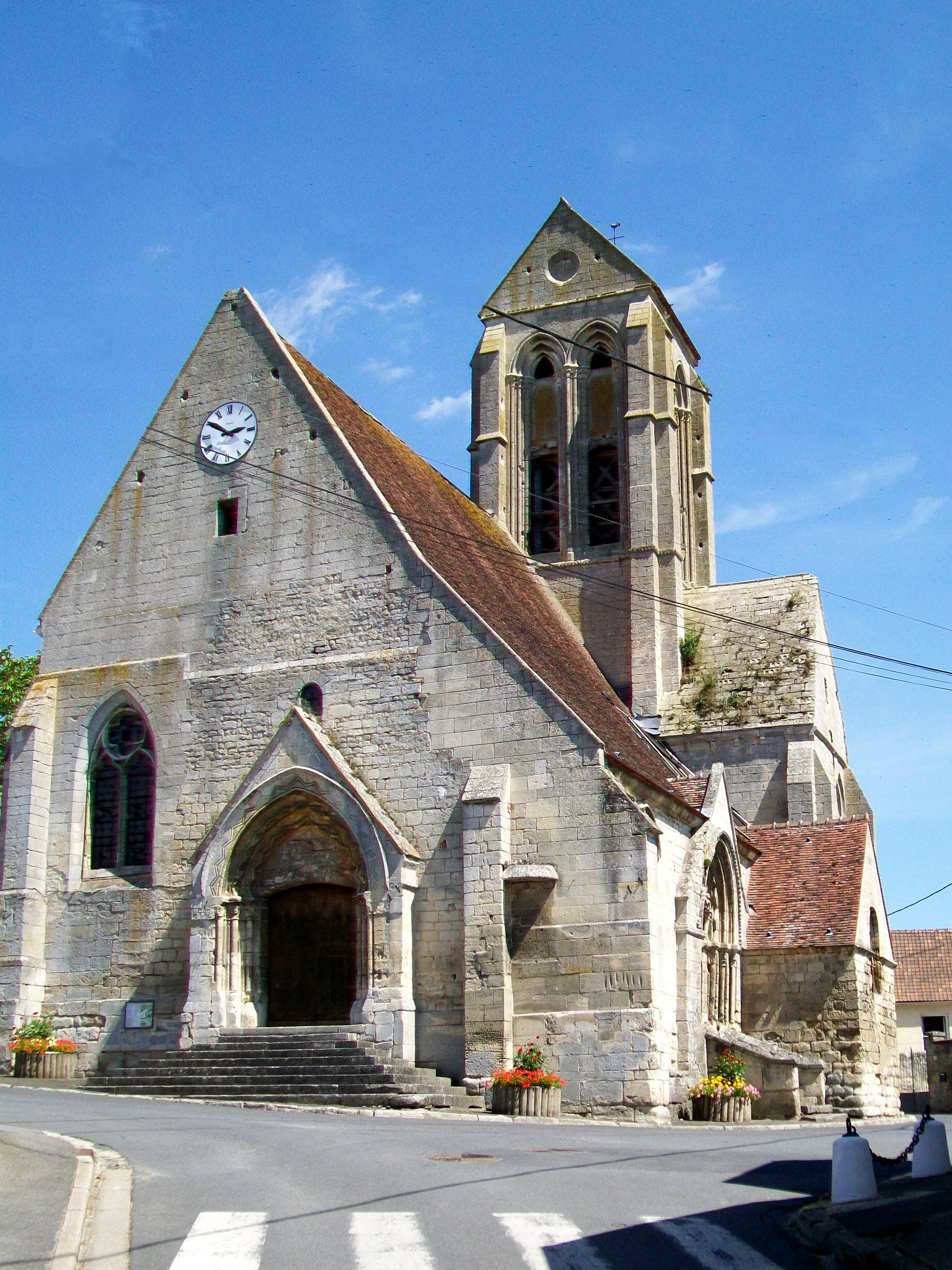 L'église Saint-Vaast, façade occcidentale.